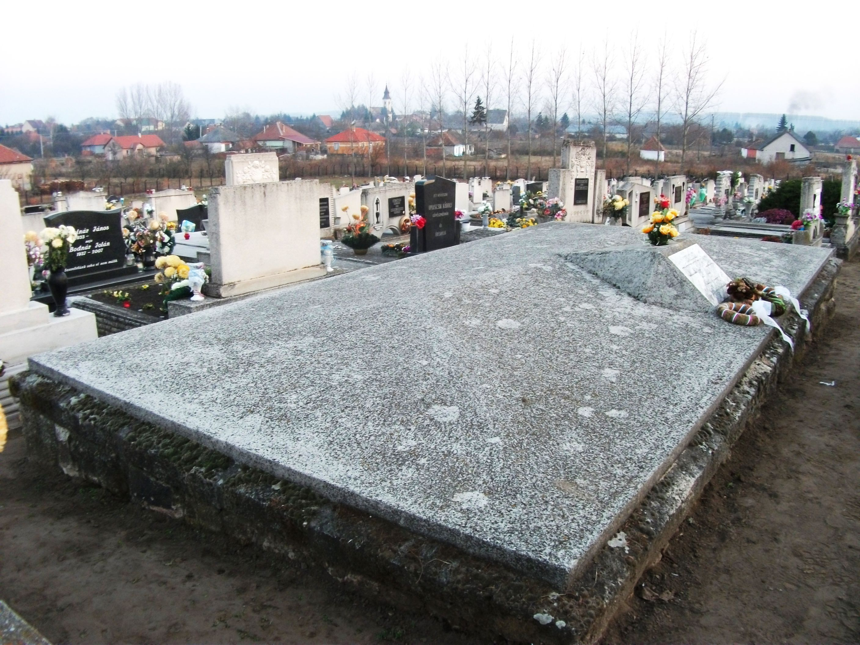 Kántor Mihály (1885-1968) tanító, néprajzi gyűjtő, cigándi "oskolamester" síremléke a cigándi köztemetőben.